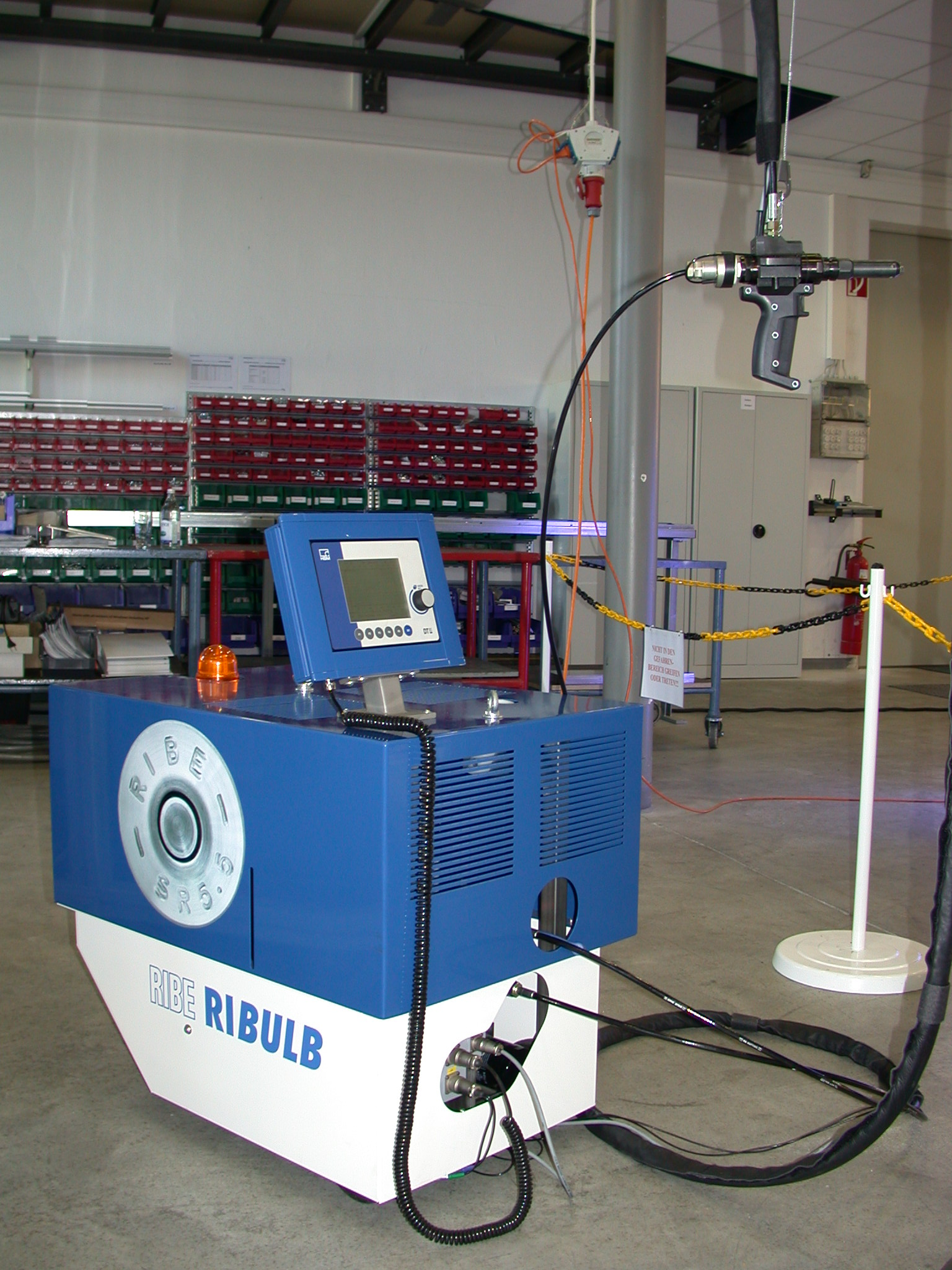 Halbautomatische Anlage zum Setzen von Blindniete